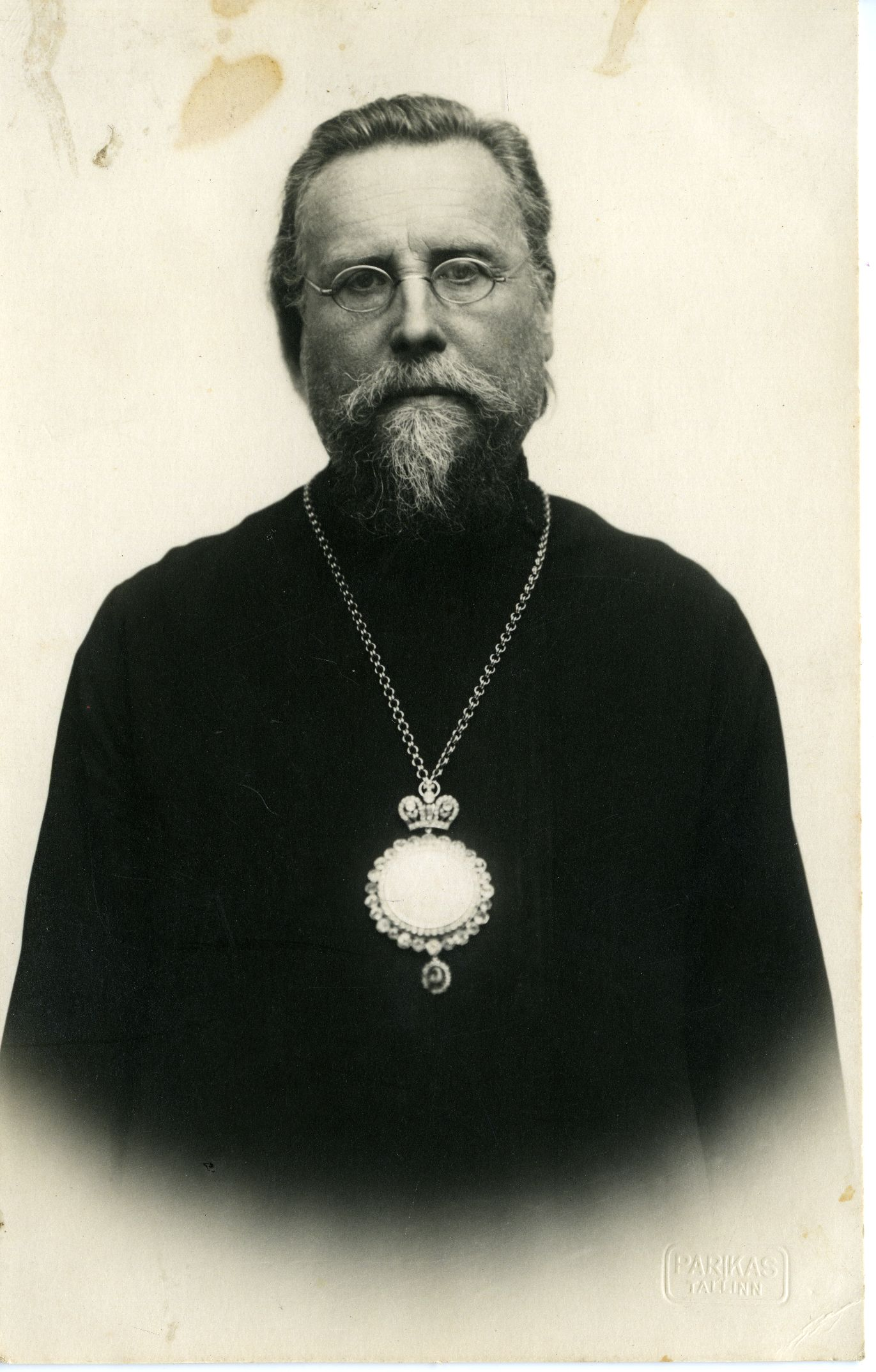 MuuseumikoguFotodOlemusfotoOriginaaloriginaalSeisundheaEraldatavad osadTehnika must-valge foto Mõõdud kõrgus: 138.0 mm; laius: 87.0 mmenne.1940 pildistamine Eesti kujutatu: Metropoliit Aleksander (1872-1953) teine nimekuju kodanikunimi Aleksander Paulus metropoliit haridustee Uue-Vändra vallakool, Vändra õigeusu kihelkonnakool. 1884–1894 Riia Vaimulikus Koolis ja Seminaris töö ja tegevus köster-kooliõpetaja Leesil (1894–1897), Kolga-Jaanis (1897–1900), Viljandis (1900–1901). 1901. aastal pühitseti diakoniks ning 29. augustil preestriks Hiiu-Kõrgessaare Kristuse Sündimise koguduse juures. 1903. aastal asus preestriks Karksi-Nuia püha Aleksei kogudusse. Aastatel 1908–1916 teenis preestrina Laiuse Jumalaema Sündimise koguduses ning peale seda Pärnu Issandamuutmise koguduses. 1920. aastal valiti Paulus Tallinna ja kogu Eesti peapiiskopiks ja Eesti Apostlik-Õigeusu Kiriku eestseisjaks. muud eluloolised andmed Sündis Pärnumaal Vändra kihelkonnas Uue-Vändra vallas Orikülas Hauamäe talus talupidaja pojana 1944. aastal emigreerus metropoliit Aleksander Saksamaale ja sealt 1947. aastal Rootsi, jätkates EAÕK juhtimist paguluses. Maetud metallkirstus (arvestades tulevast ümbermatmist Eestisse) Stockholmi Metsakalmistule. muud eluloolised andmed 1929–1931 - IV Riigikogu liige 1937 - Rahvuskogu II koja liige I Riiginõukogu liige Apostlik-Õigeusu Kiriku esindajana.